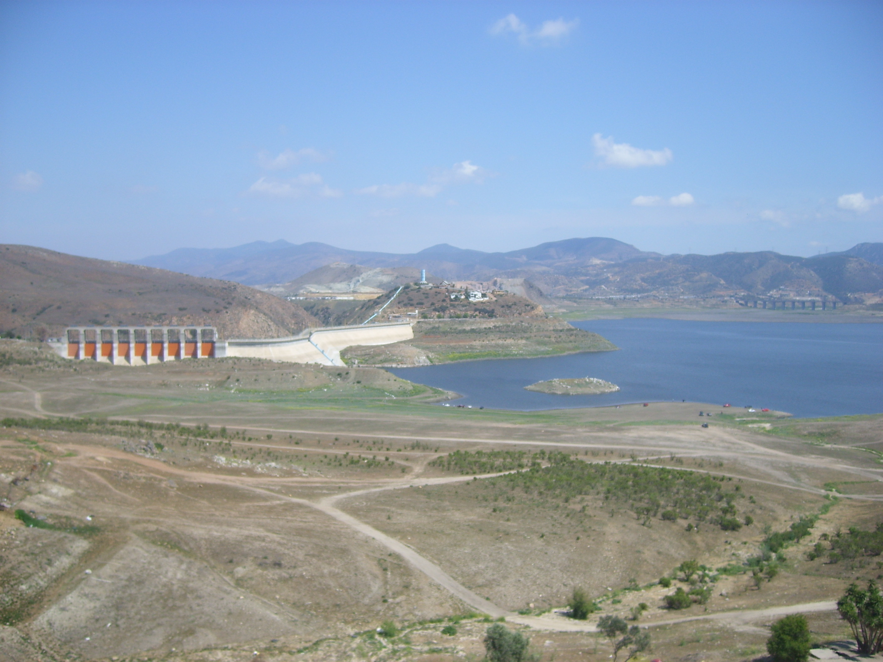 Presa Abelardo L. Rodriguez